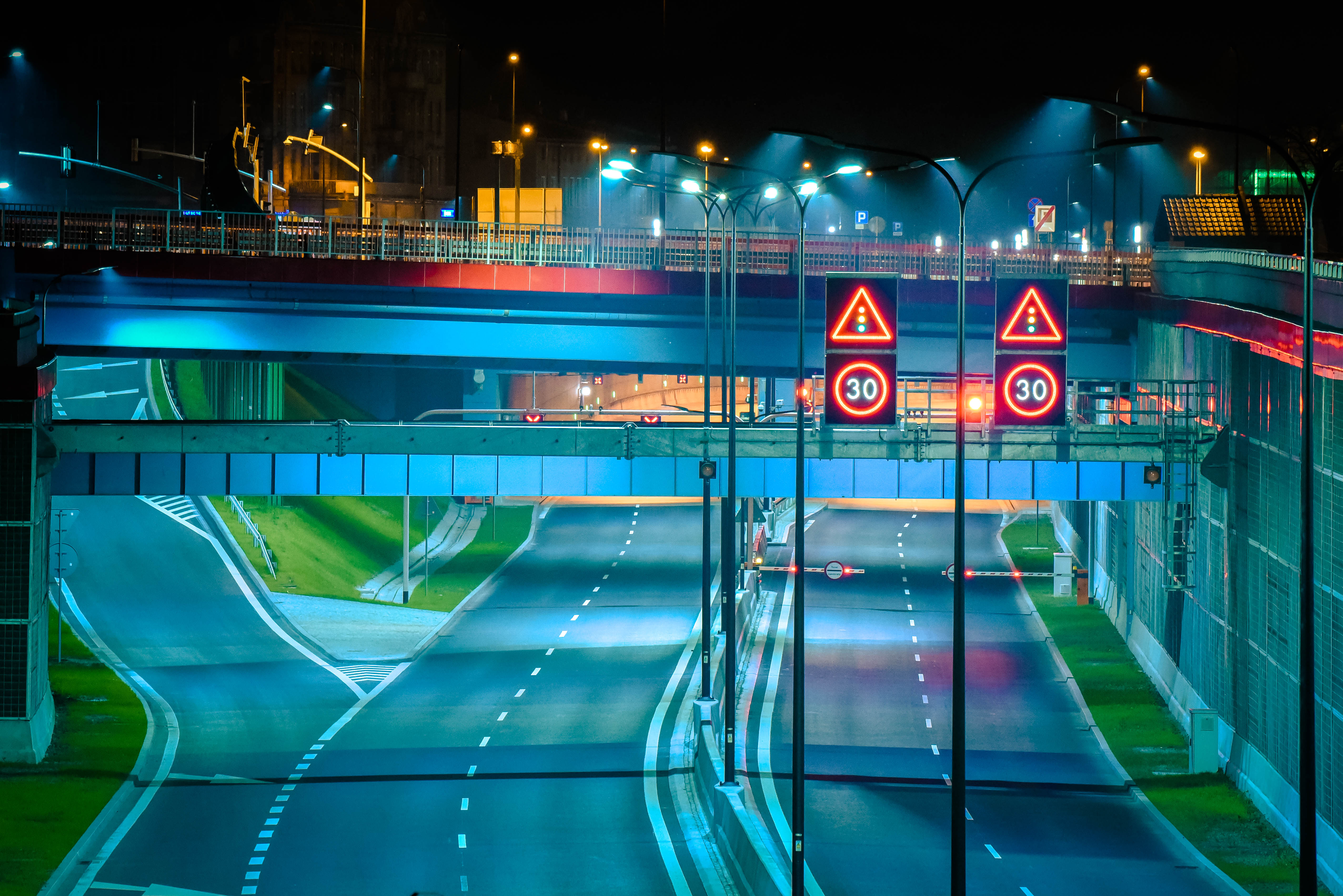 Drogowa Trasa Średnicowa w Gliwicach